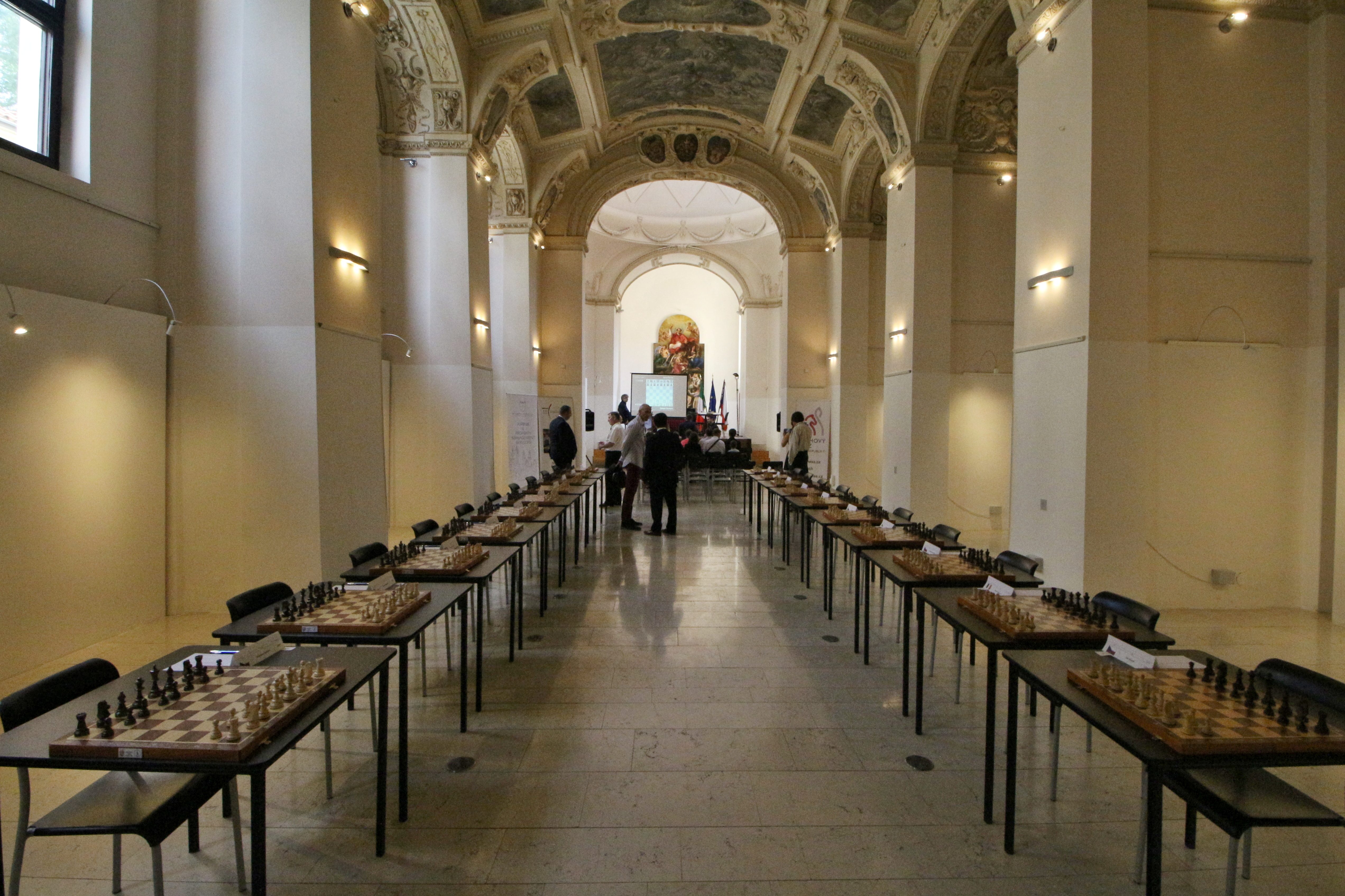 Vlašský špitál